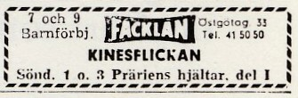 Biografannons Facklan 1948